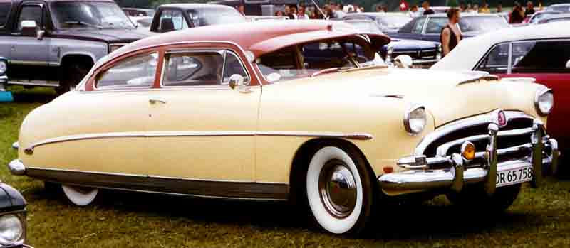 Hudson Coupé